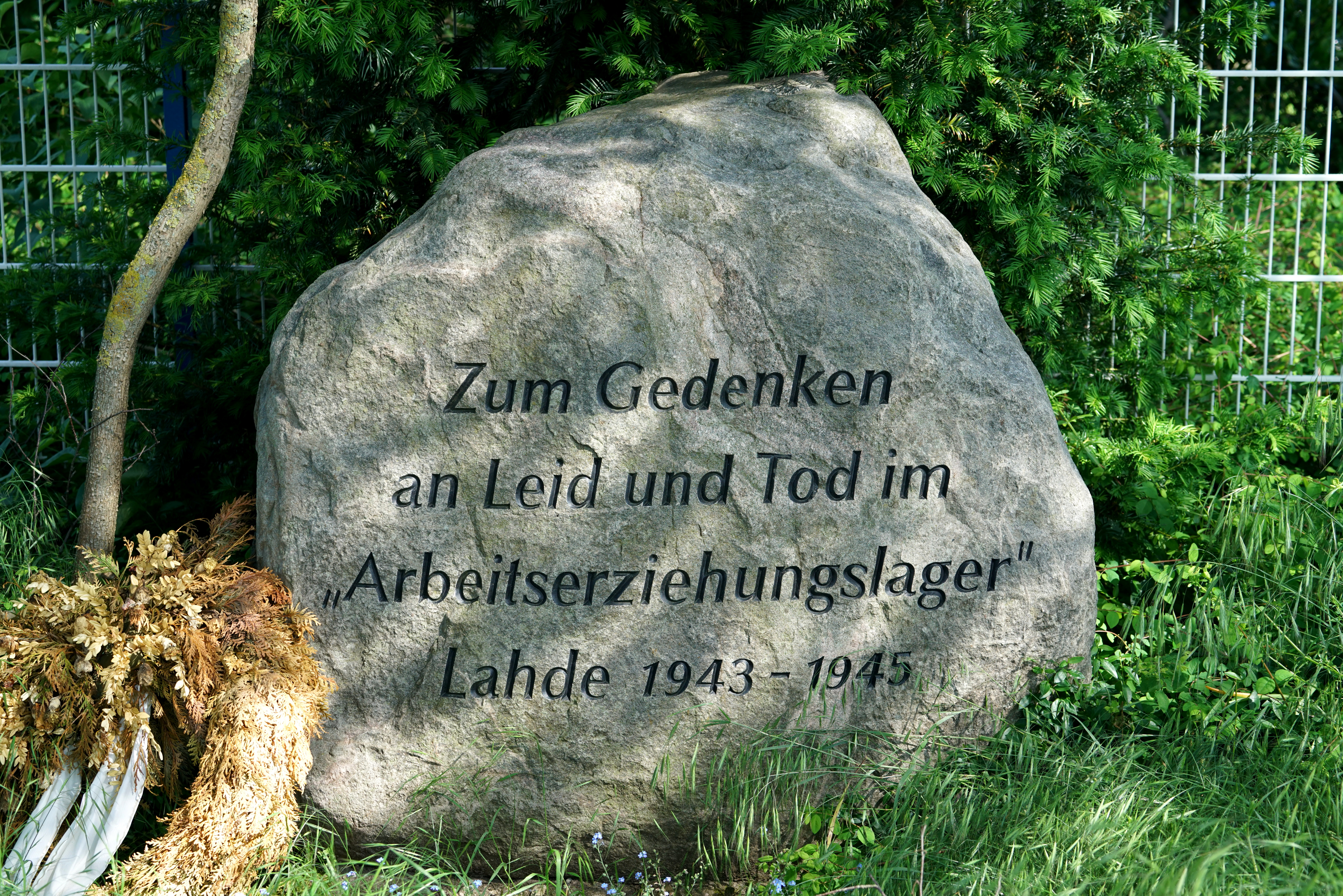 Gedenkstein für das Arbeitserziehungslager Lahde